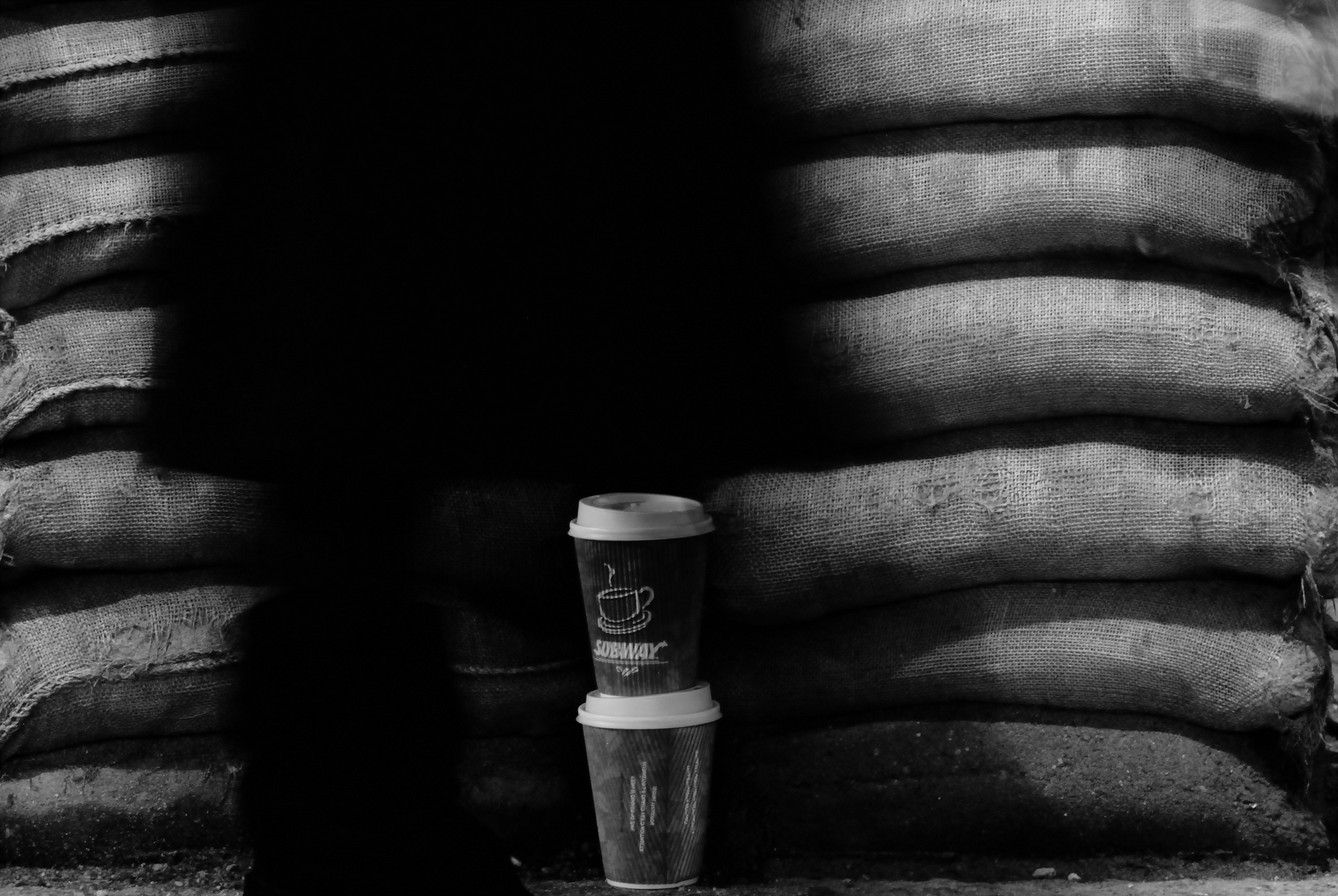 Photograph by Topi Pigula